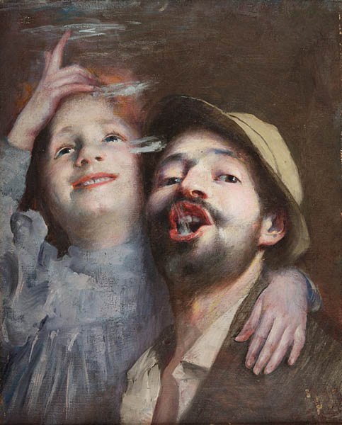 Sztukmistrz